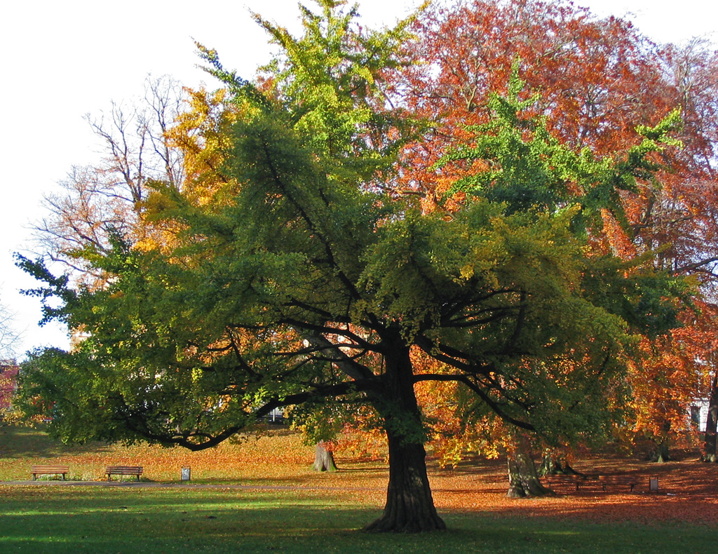 Beschreibung: Ginkgo Baum (Ginkgo biloba) Fotograf: Darkone, de:25. Oktober 2004 Siehe auch: Blattwerk